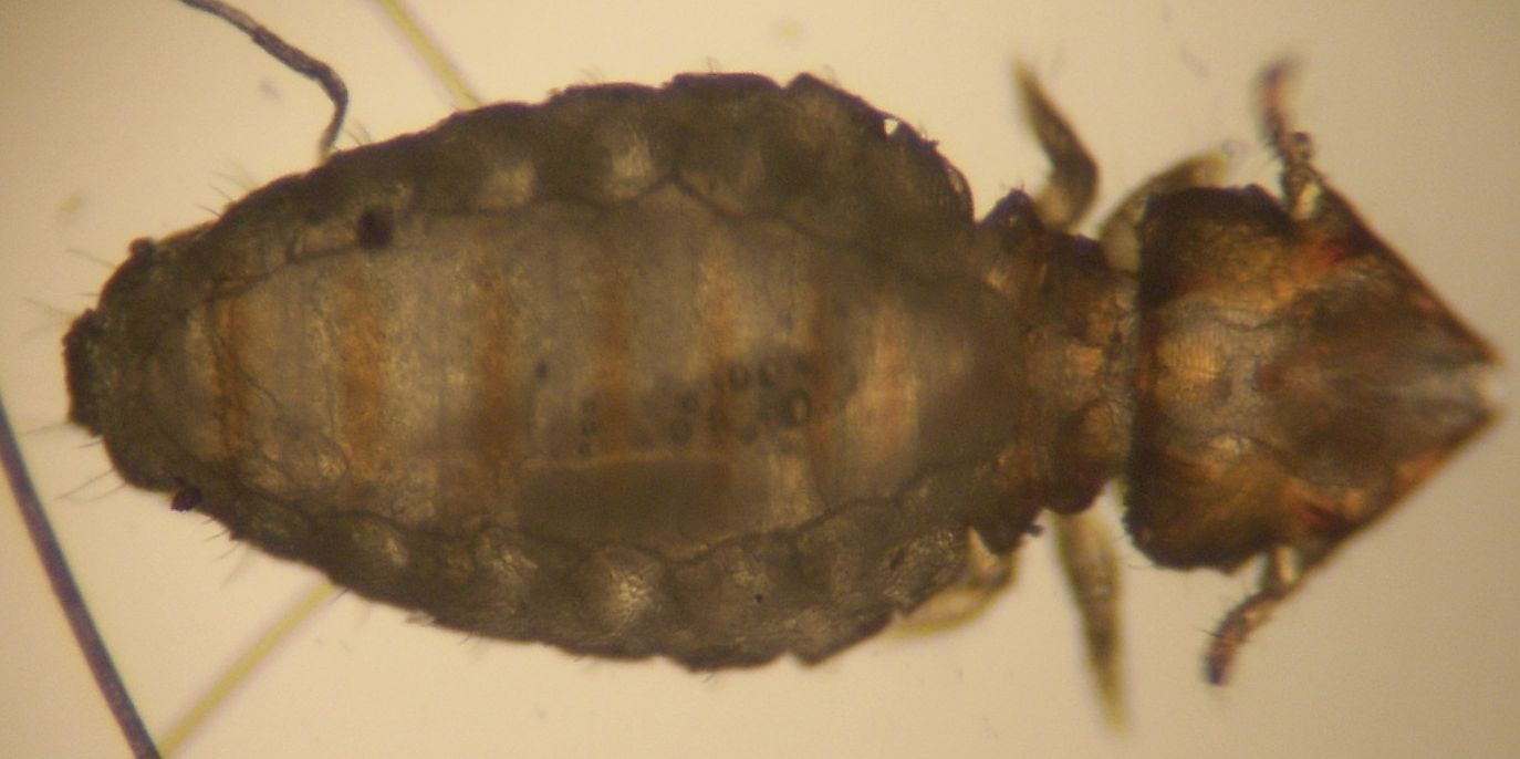 Felicola_subrostratus (Cat louse, Katzenhaarling)